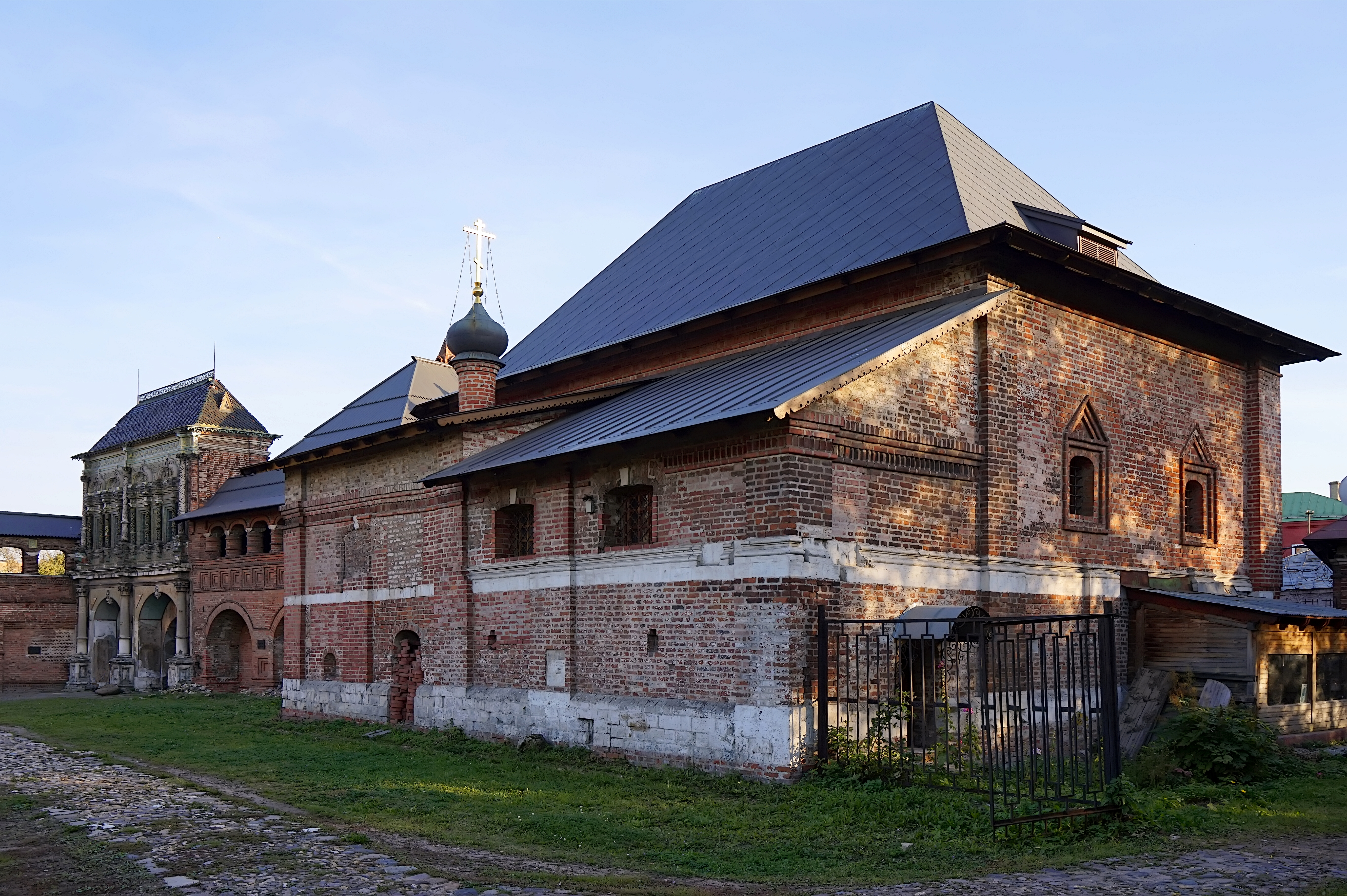 Храм Воскресения с Никольским приделом, домовая крестовая церковь епископов Сарских и Подонских: Крутицкая ул., дом 17, строение 2, Таганский, Центральный округ, Москва